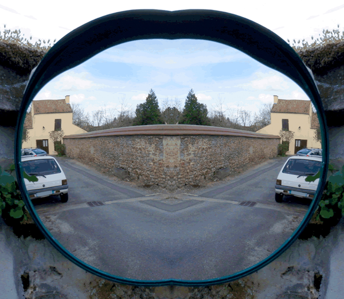 à droite, telle qu'elle apparaît aujourd'hui, au bout de la Sente Blaise Cendrars, au Tremblay-sur-Mauldre (Yvelines)